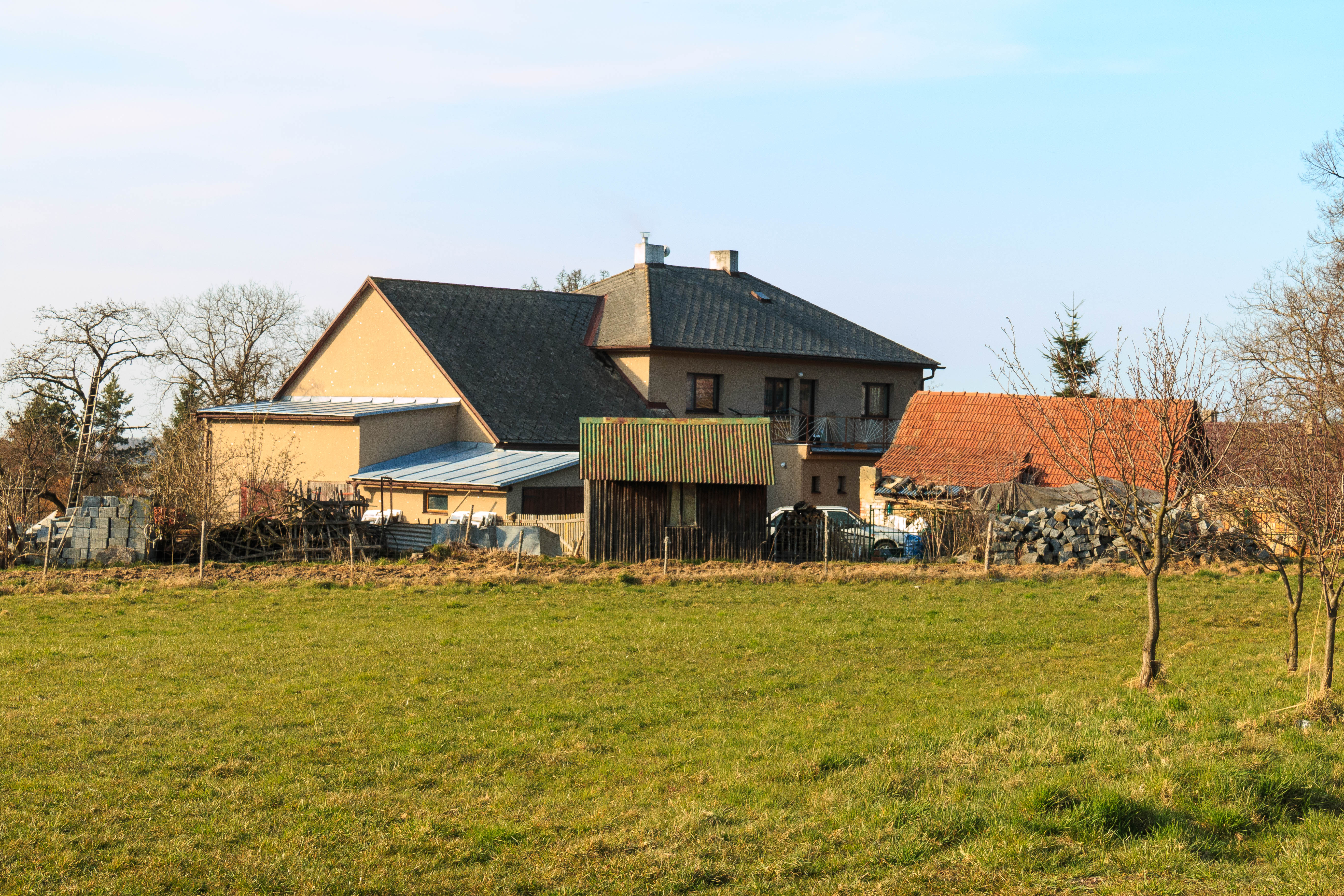 Dachovské paseky 22